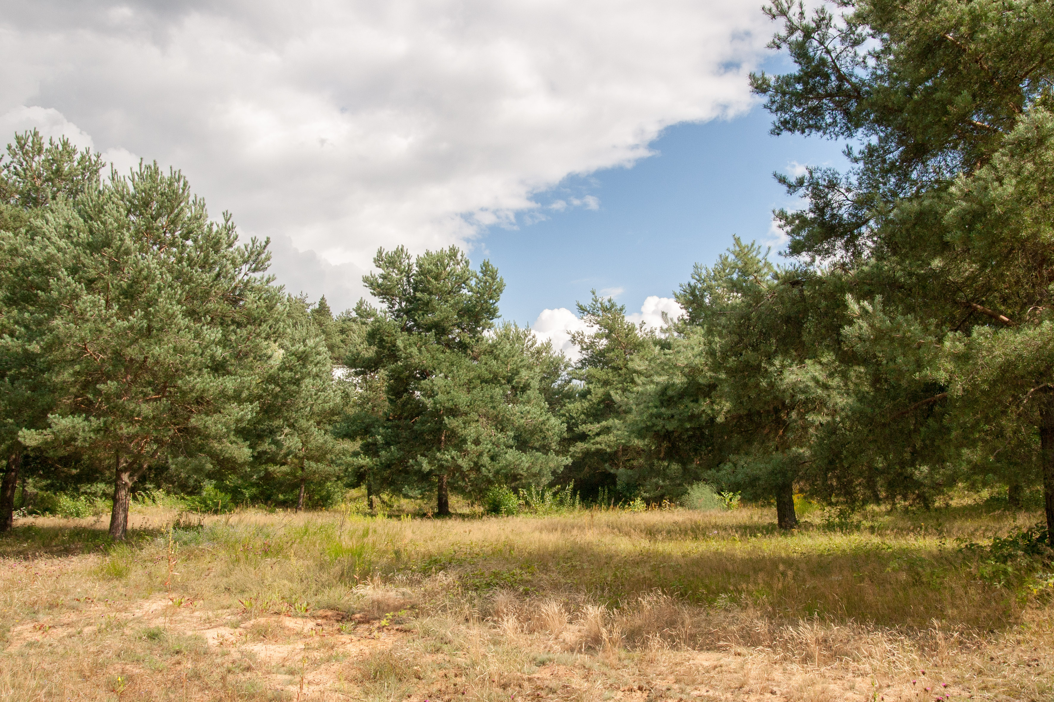 Sandmagerrasen Brunnleite, Röthenbach an der Pegnitz, Geschützter Landschaftsbestandteil